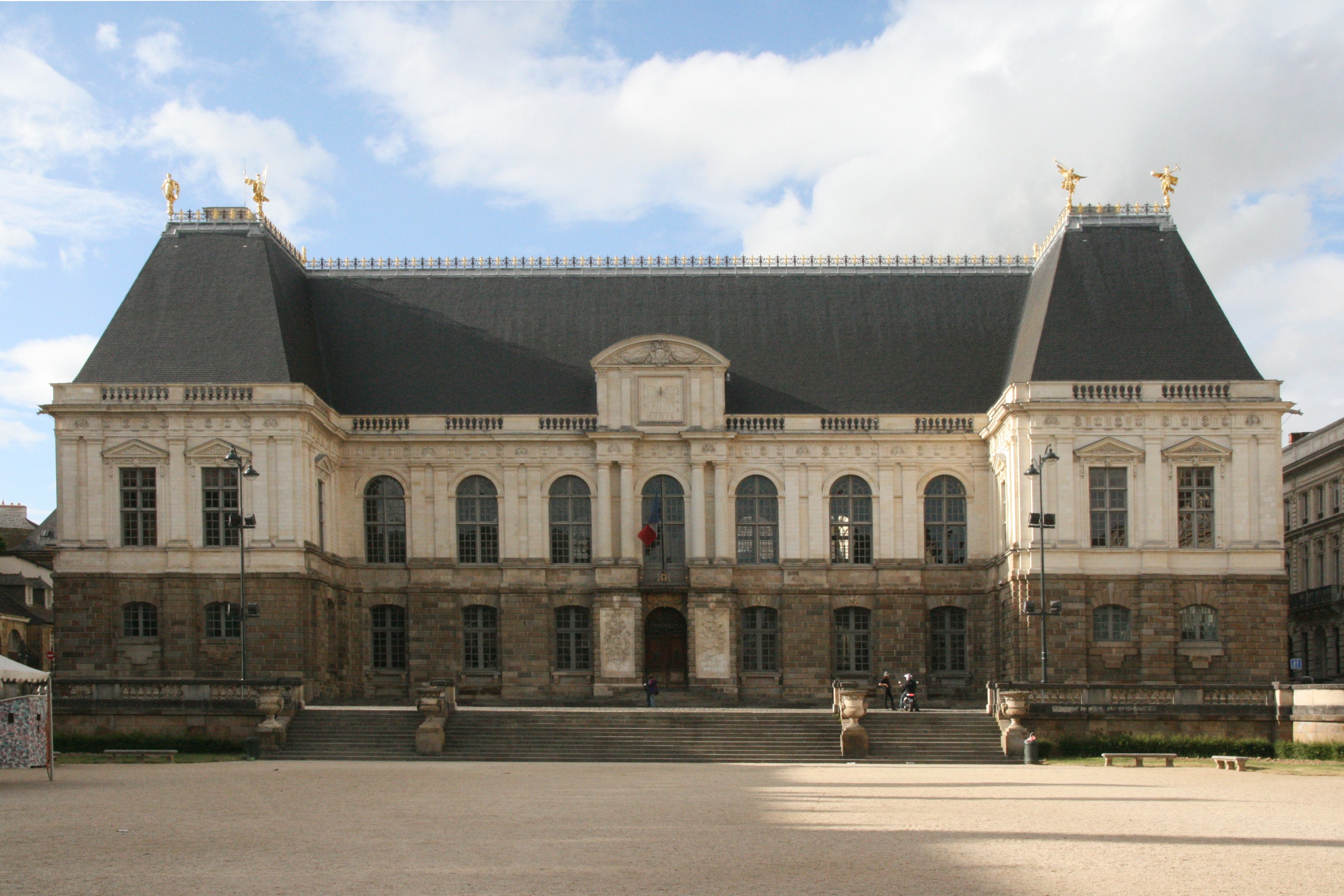 Le Parlement de Bretagne, à Rennes, vu depuis la place du Parlement.